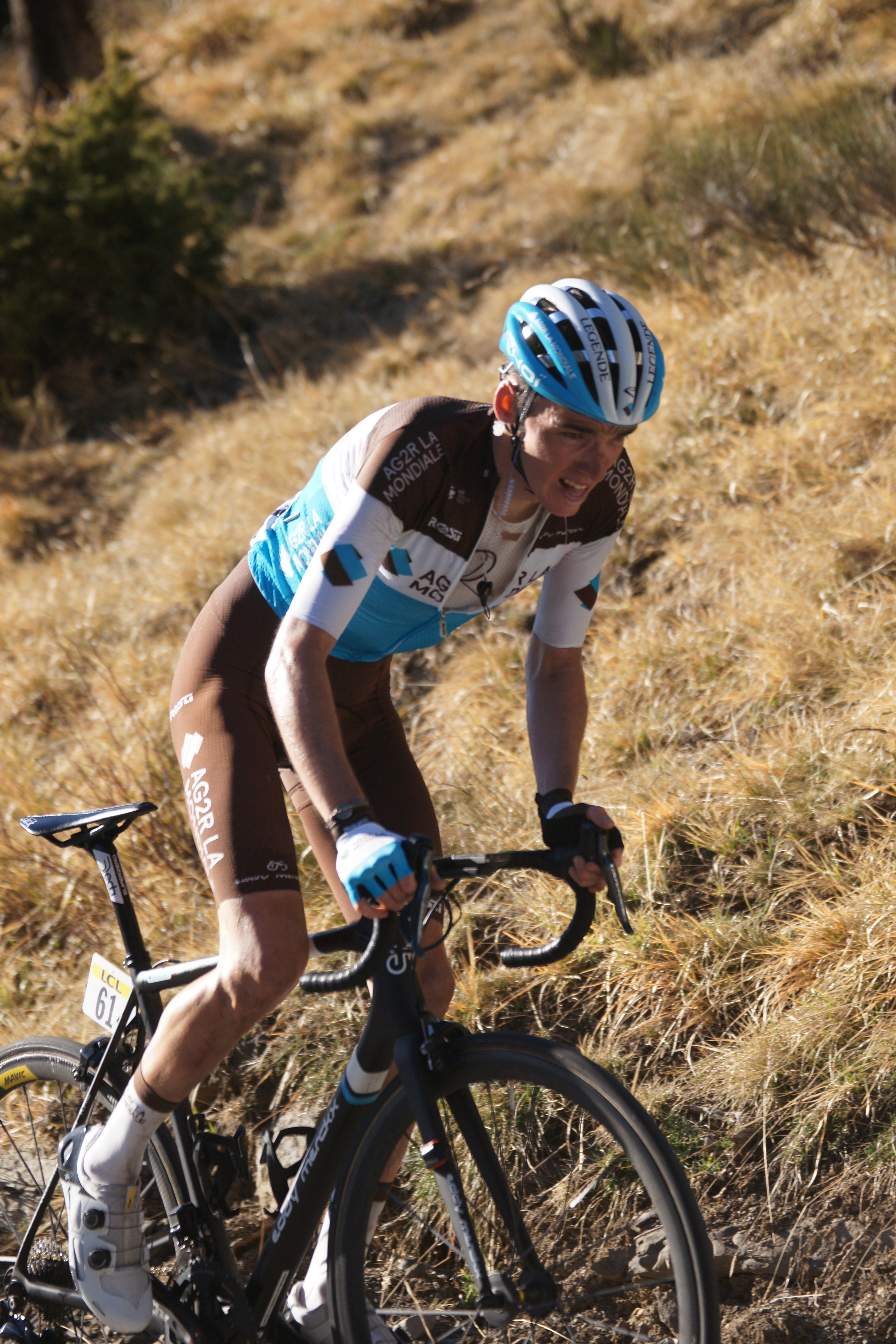 Romain Bardet, Paris-Nice 2019